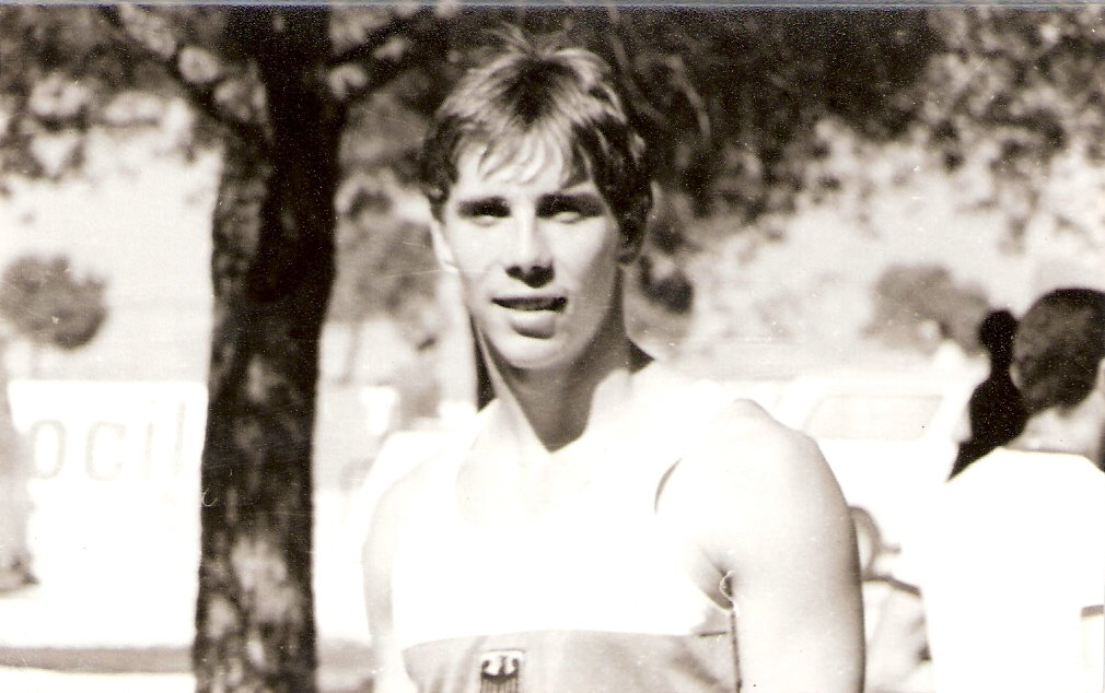 WM 1980: Jürgen Kläber